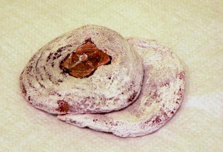 柿饼 拍摄